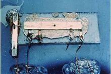 Jack Kilby'nin orjinal entegre devresi